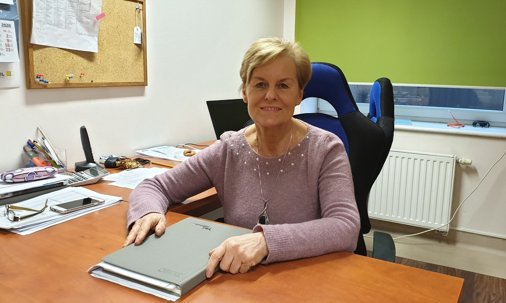 Barbara Turakiewicz - zastępca dyrektora ds. lecznictwa szpitala w Stargardzie